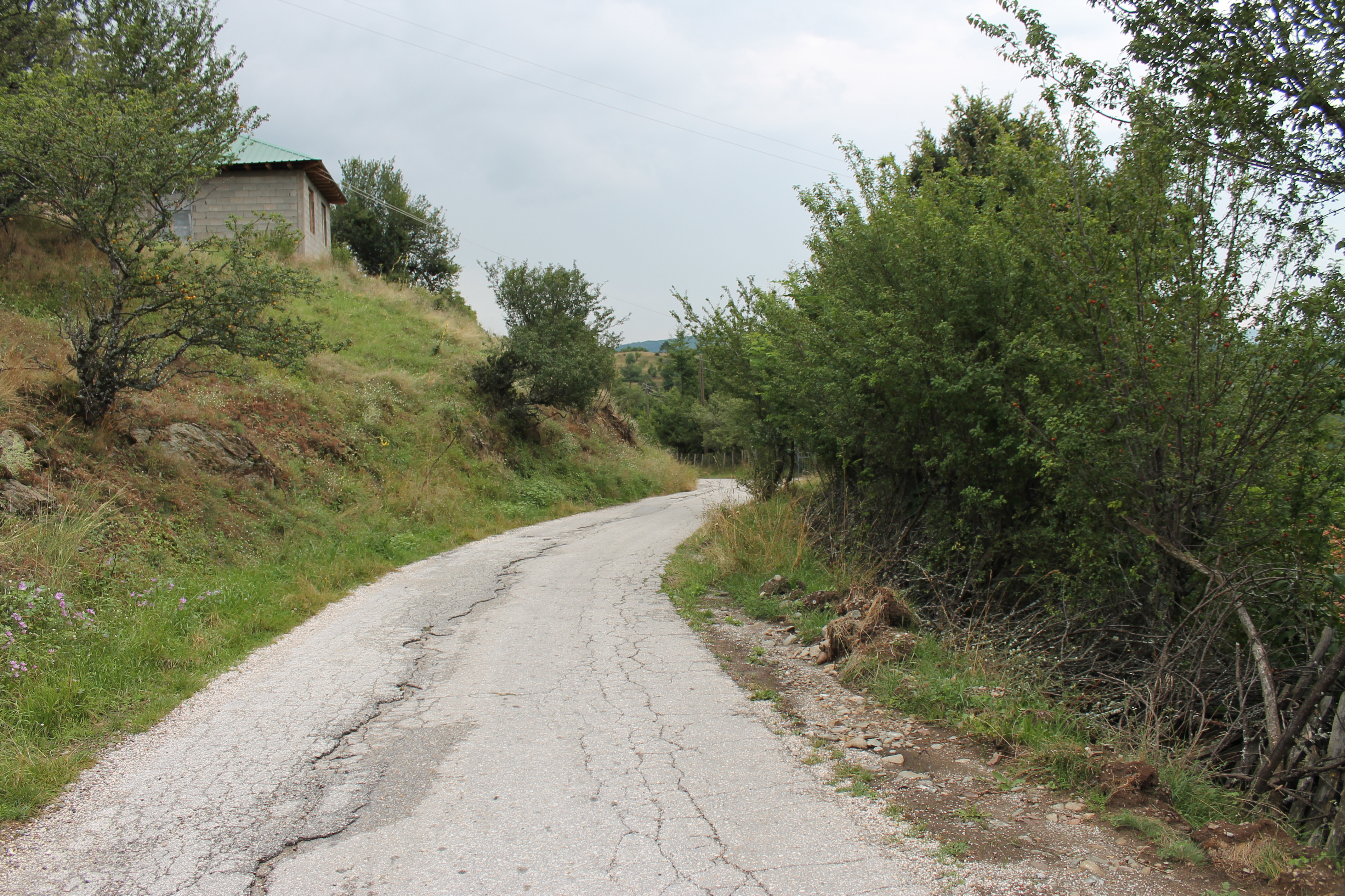 Put koji prolazi kroz selo Osiče, Kriva Palanka, Makedonija.